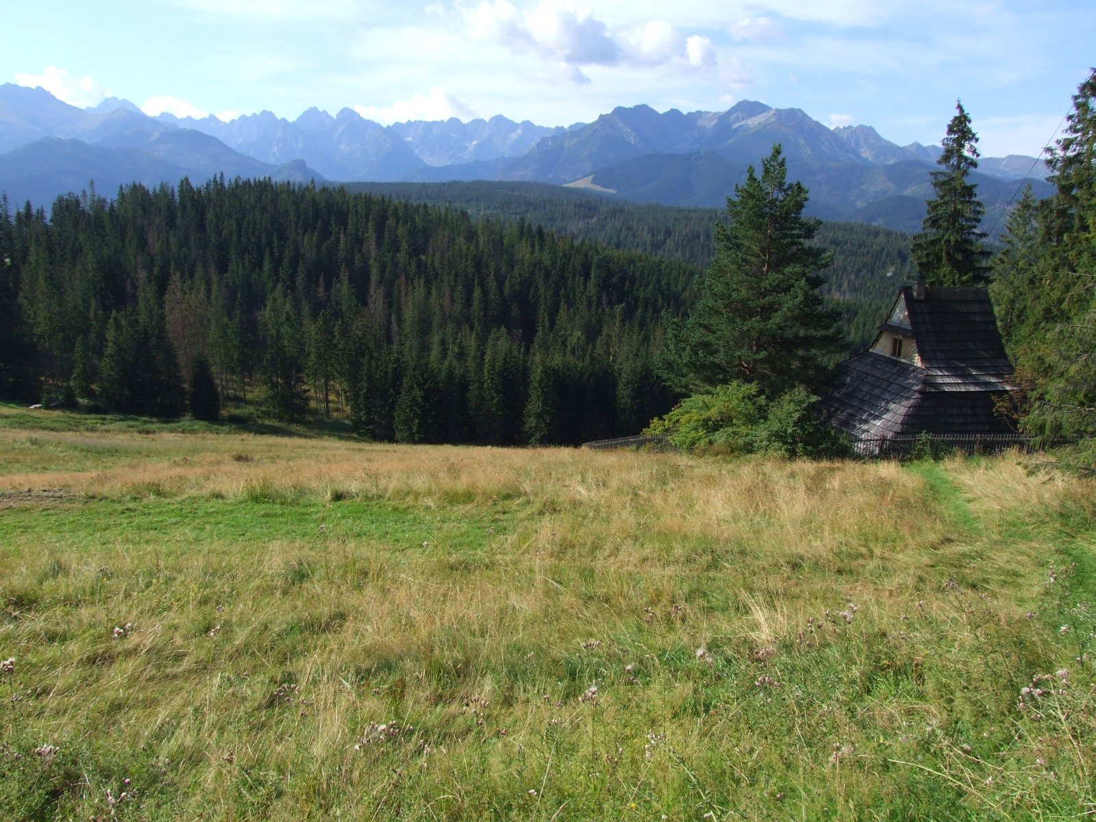 Polana Głodówka w Tatrach (Bukowina Tatrzańska) i widok na Tatry